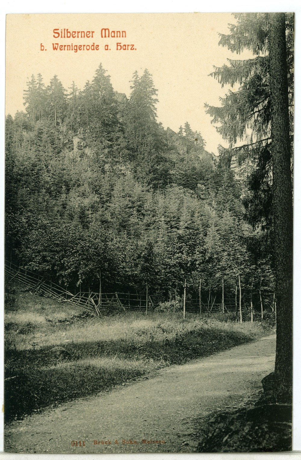 Wernigerode; Silberner Mann This postcard is from publisher Brück & Sohn in Meißen ( This postcard has a unique number 09111 and is available in a higher resolution at the publisher. This images was uploaded in a cooperation project between Wikipedians and the publisher.